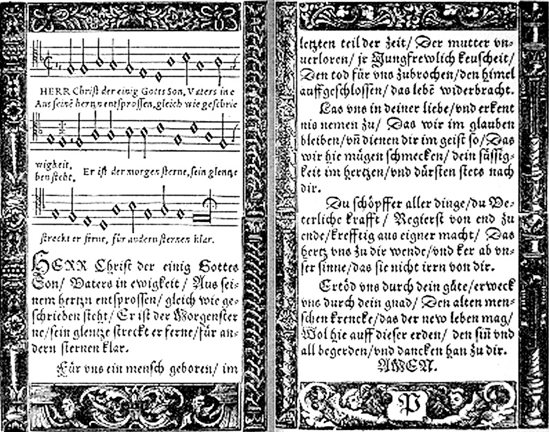 Herr Christ, der einig Gotts Sohn, Babstsches Gesangbuch 1545